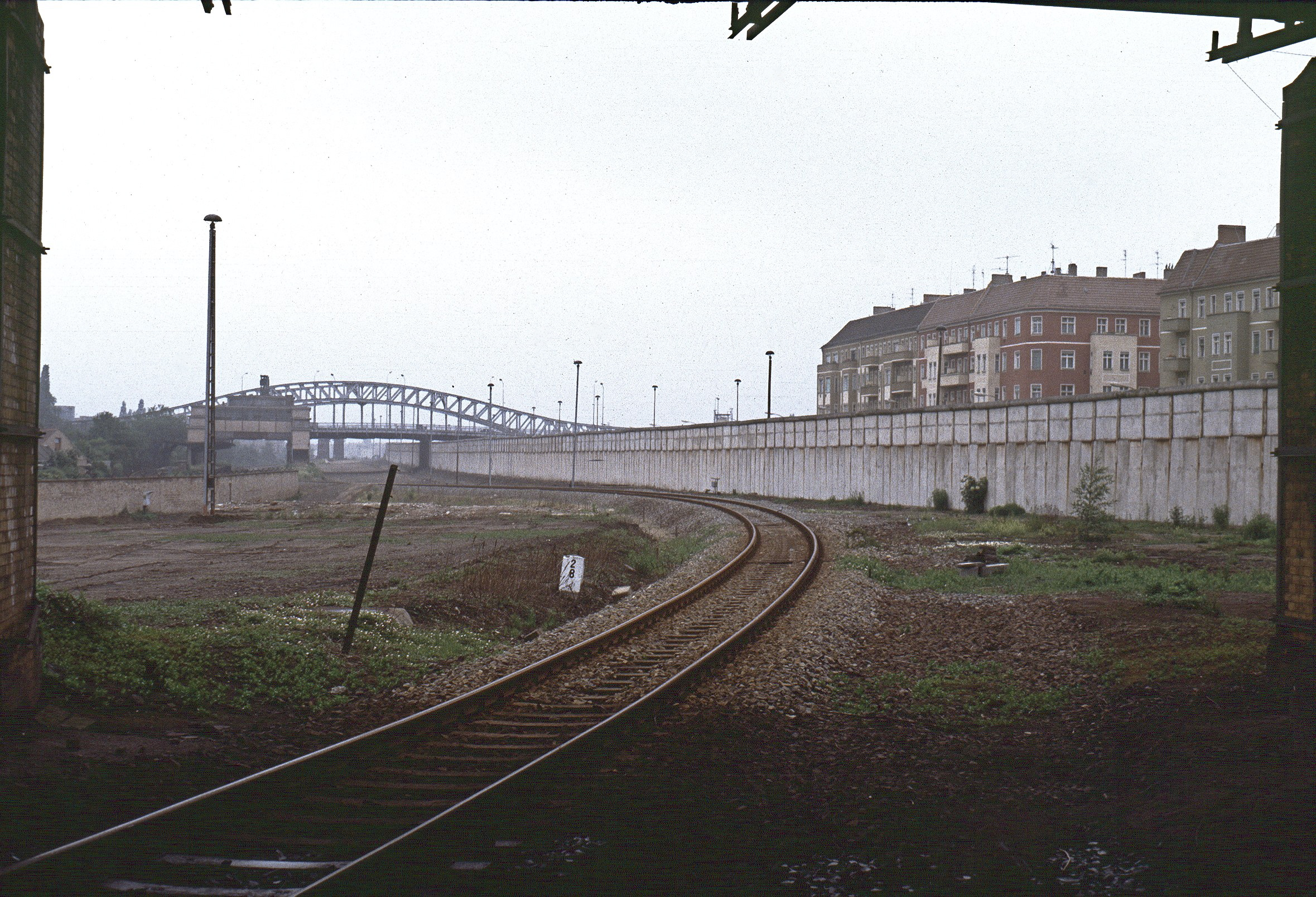 Nordbahntrasse mit Berliner Mauer, Bösebrücke und Bahnhof Bornholmer Straße